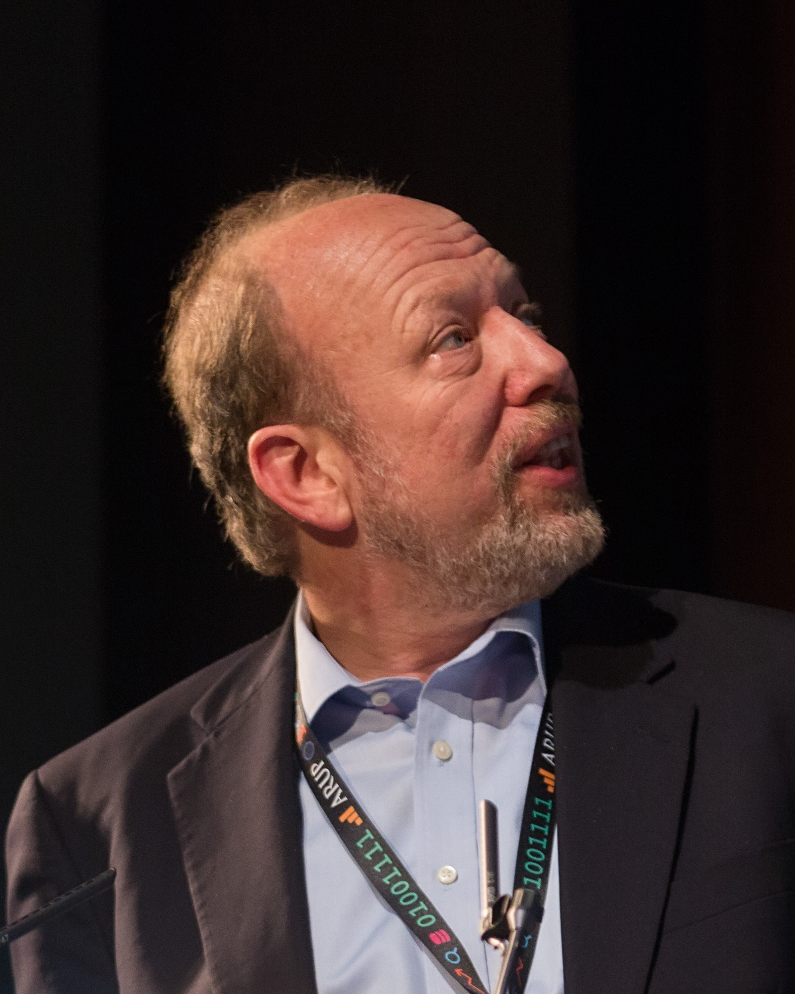 ODISummit_4Nov_194